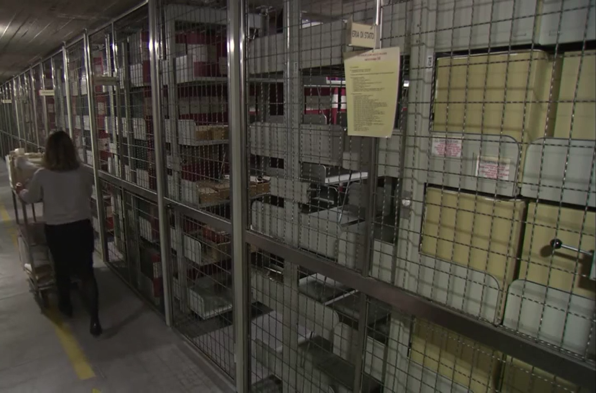 Corridoio e scaffali all'interno dell'Archivio segreto vaticano